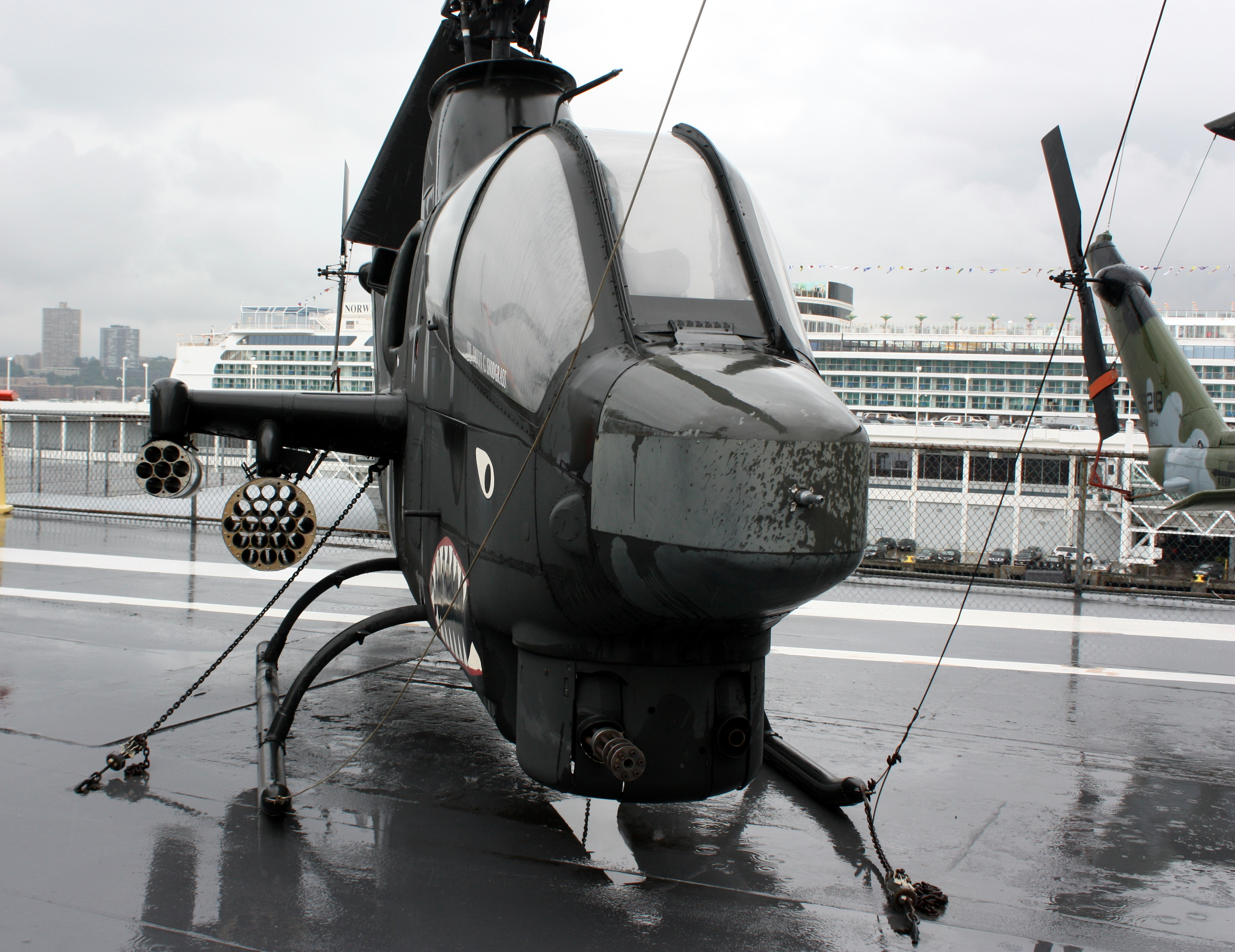 Intrepid Sea-Air-Space Museum